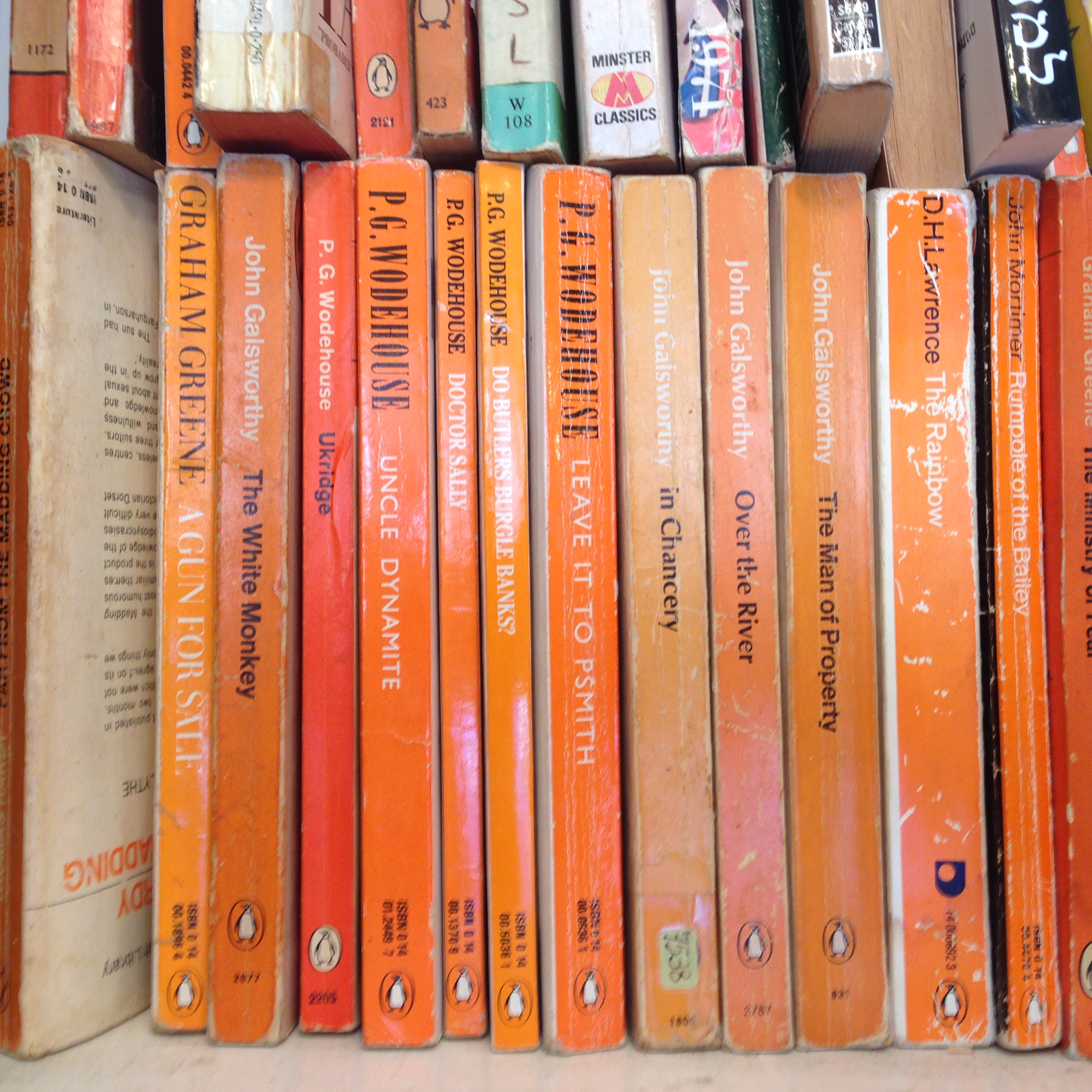 ספרים של פ. ג. וודהאוס על מדף חנות ספרים משומשים בירושלים. צולם בינואר 2016.